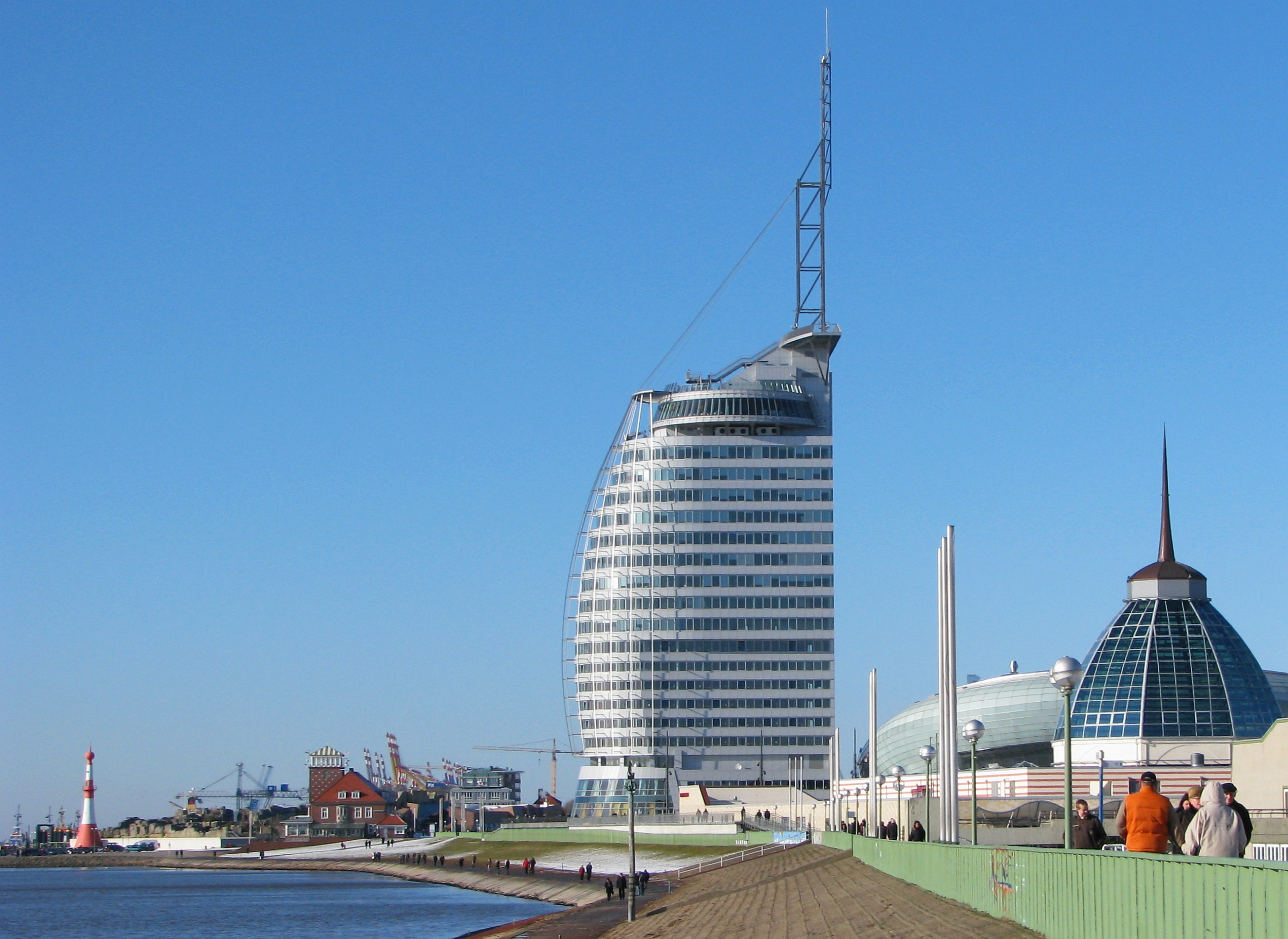 Viel Architektur im Stadtviertel "Havenwelten" in Bremerhafen; von links Unterfeuer, Sail City, Klimahaus und Mediterraneo - und etwas zur zeitlichen Entstehung, der Leuchtturm: Unterfeuer Baujahr 1893, dahinter Überseehafengebiet Ende 19. Anfang 20. Jh., fast schon ein Wahrzeichen: Sail City aus dem Jahr 2008, rechts dahinter das Klimahaus (2007) und ganz rechts im Vordergrung Mediterraneo aus dem Jahr 2008.